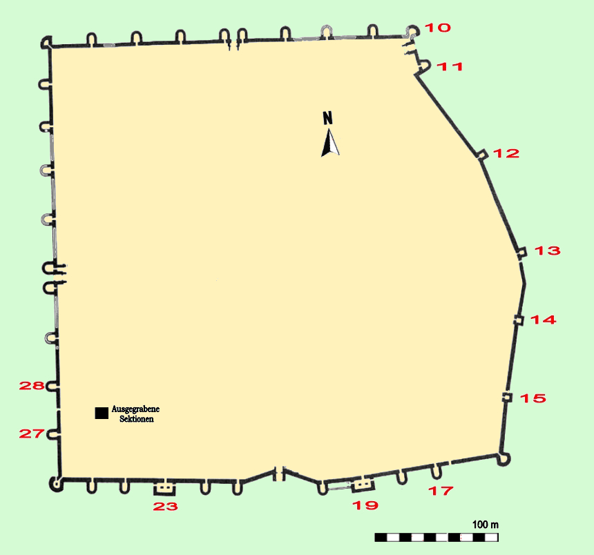 Umwehrung des Kastells Abrittus (Razgrad, BG), Zustand 4. Jhdt. n. Chr.